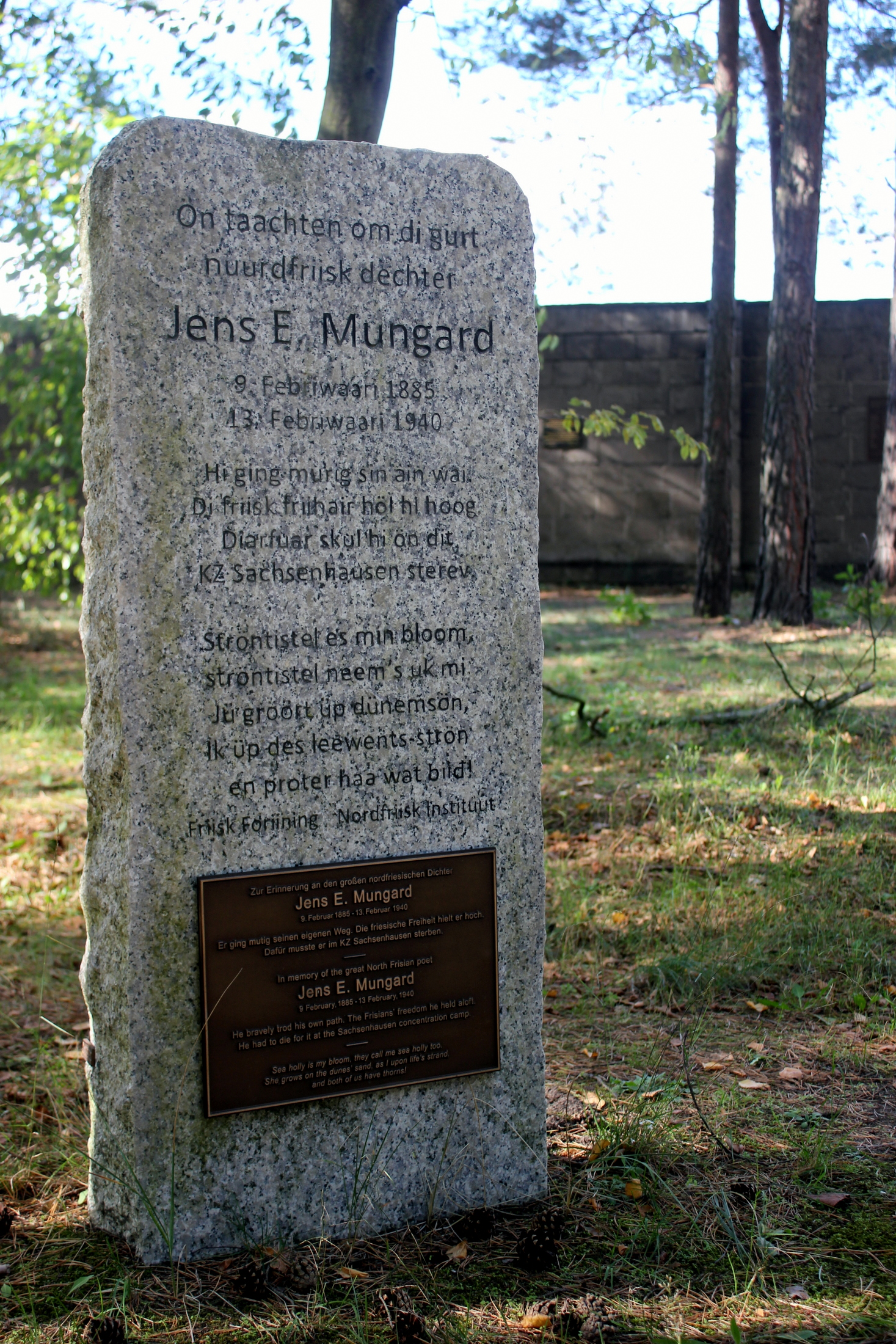 Hornjoserbsce: Pomnik za friziskeho basnika Jensa Mungarda w koncentraciskim lěhwje Sachsenhausen.